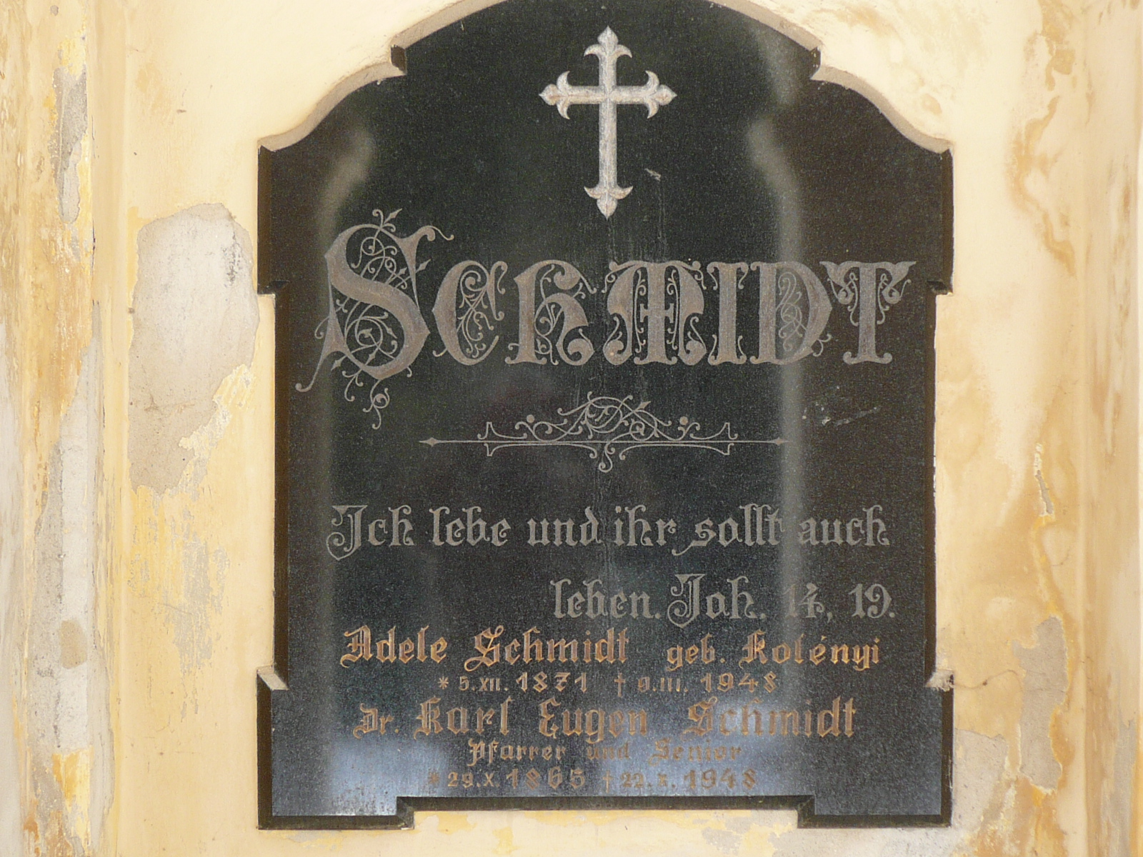 Evangelischer Gaistor-Friedhof zu Preßburg (Bratislava)